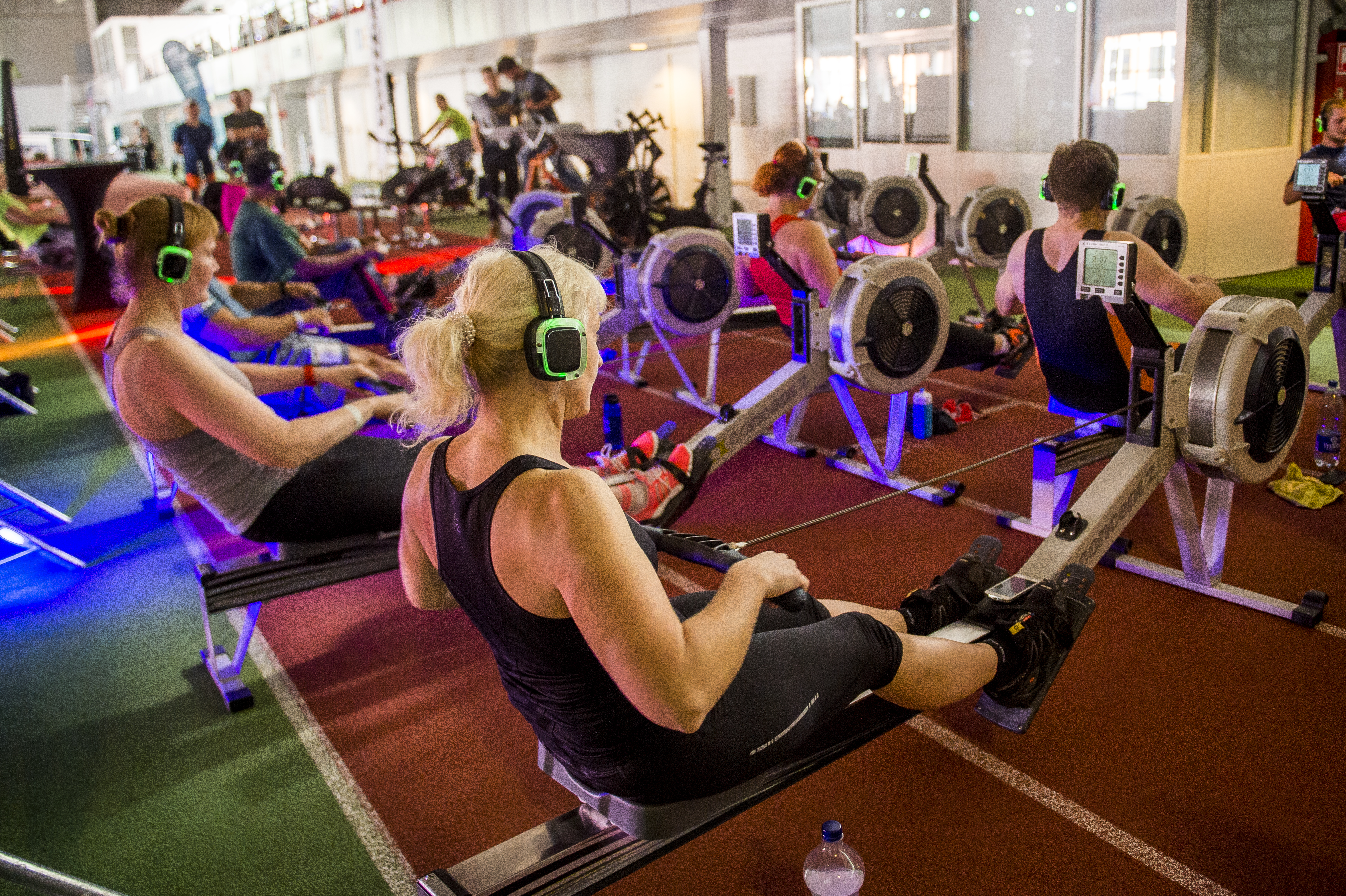 Sõudespinningu treening Reebok Festivalil Tallinnas